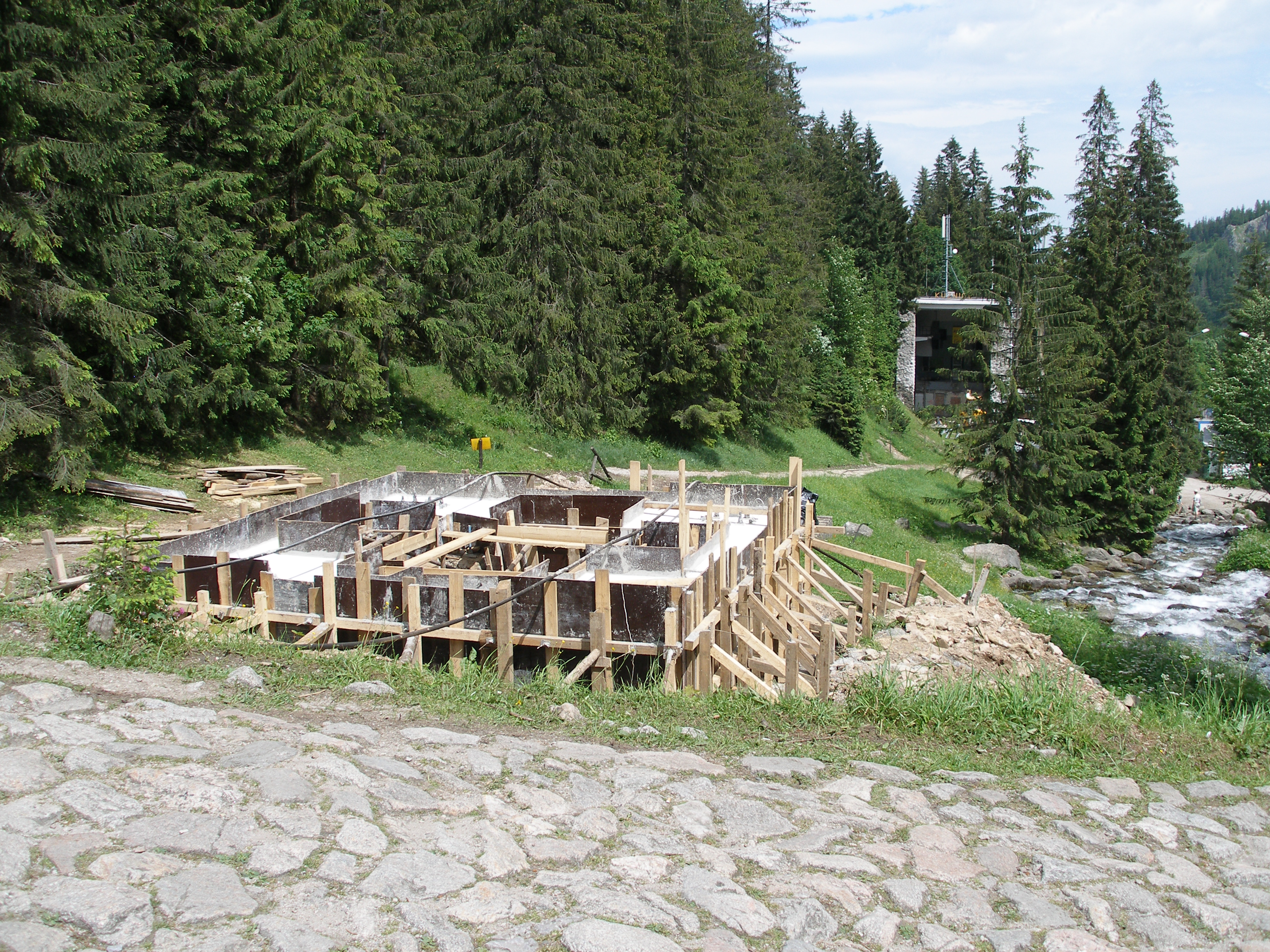 Przebudowywana kolejka na Kasprowy Wierch. Kuźnice